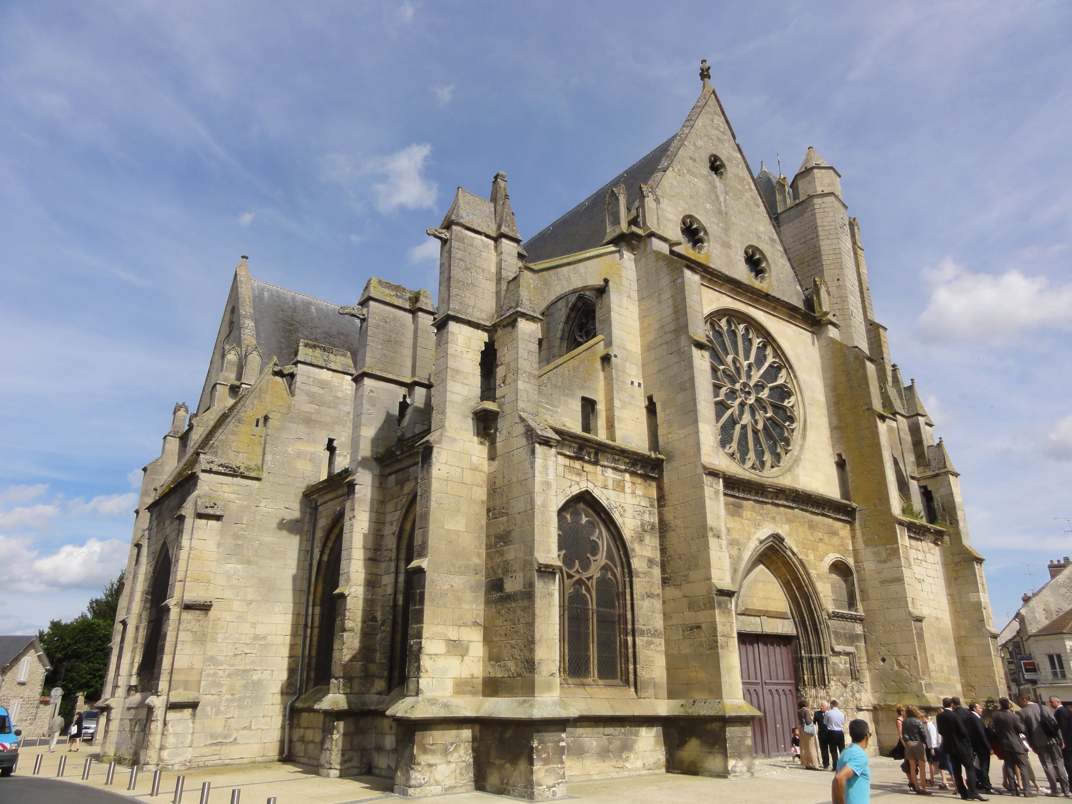 Église Notre-Dame de Chambly